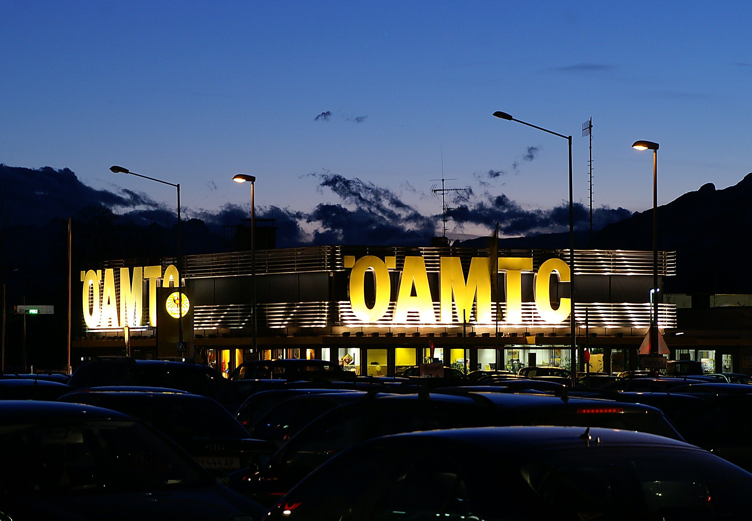 der “ÖAMTC” im Schoren an der Autobahnausfahrt Dornbirn süd; Blick vom Messepark .